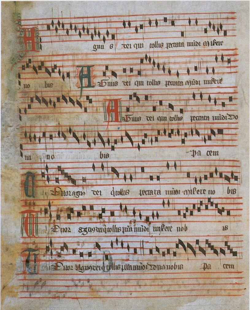 Agnus Dei